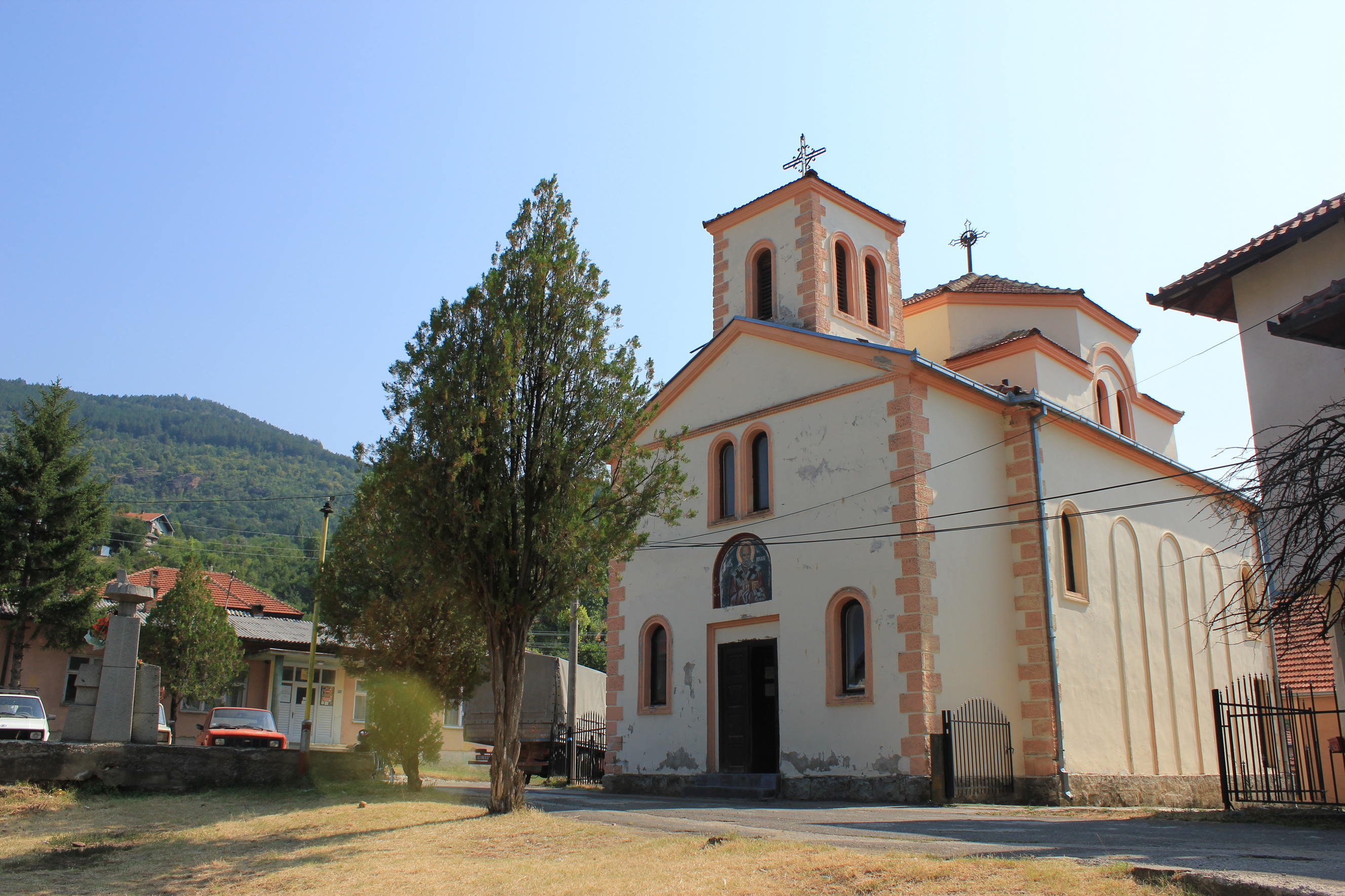 Hornjoserbsce: Cyrkej swj. Nikole w južnoserbiskim městačku Trgovište.